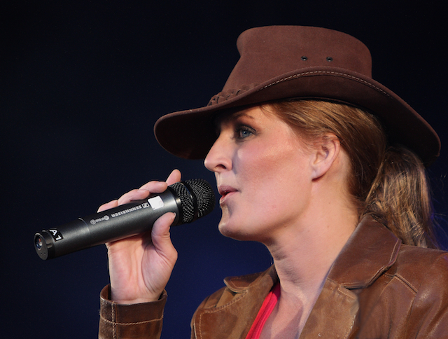 Stine Nilsen på Ålesund Båtfestival 2008